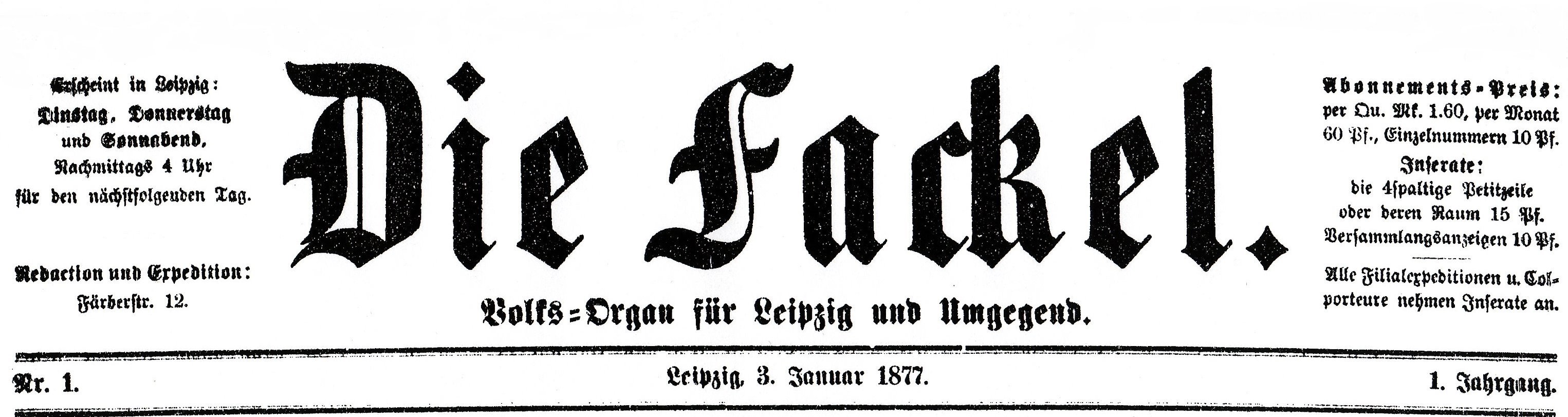 Die Fackel war ein Volksorgan für Leipzig und Umgegend.